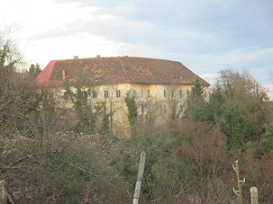 Grad Raka